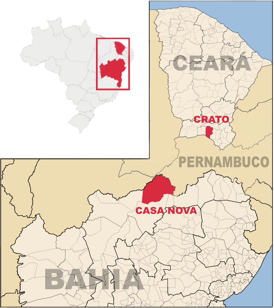 Mapa de localização dos eventos de 1938 em Casa Nova (Bahia) e Crato (Ceará), no Movimento de Pau de Colher.